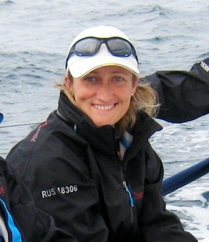 Басалкина Анна Евгеньевна